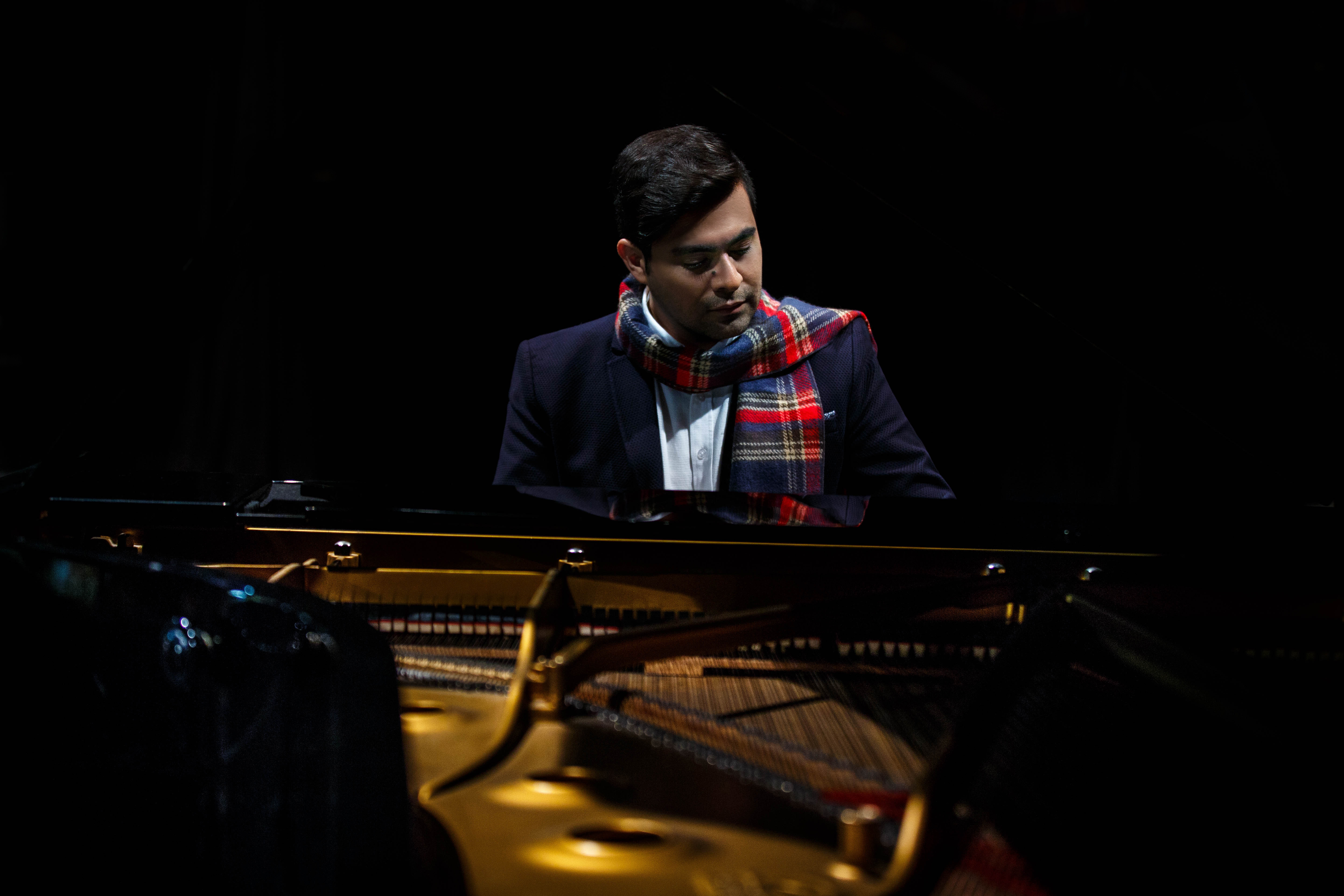 عکس مربوط به کنسرت زمستان 96 مهرزاد خواجه امیری است.